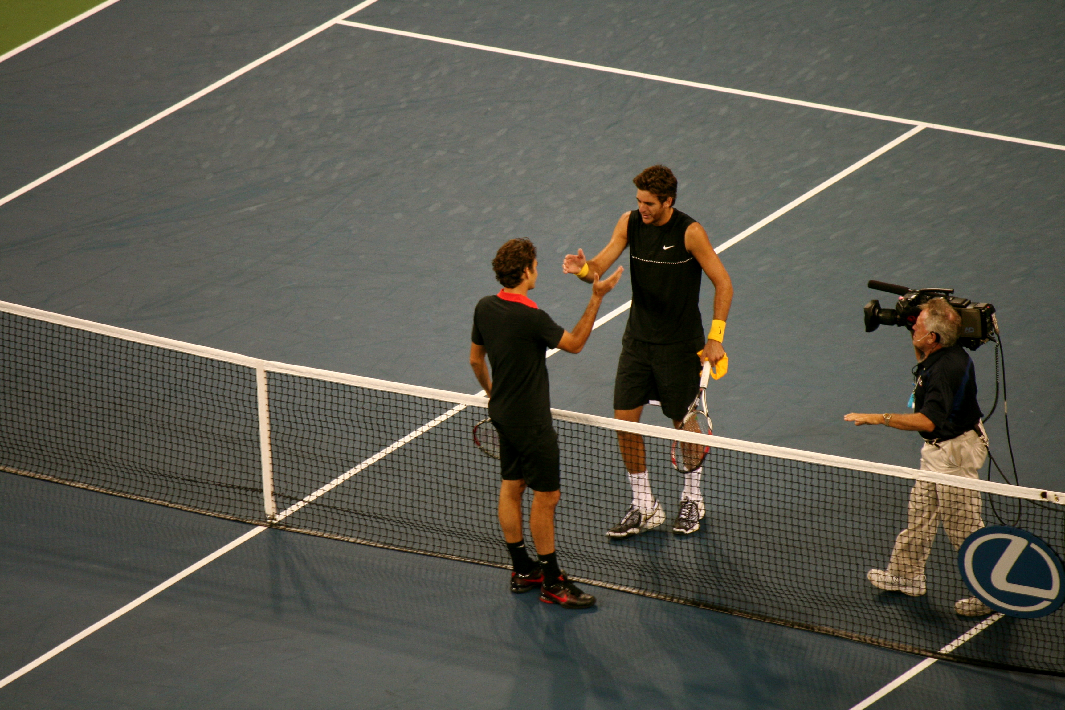 Juan Martín del Potro wins the 2009 US Open vs Roger Federer